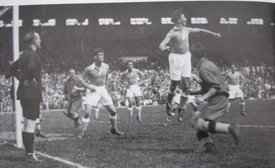 Coupe de France de football 1936-1937 : finale entre FC Sochaux et RC Strasbourg